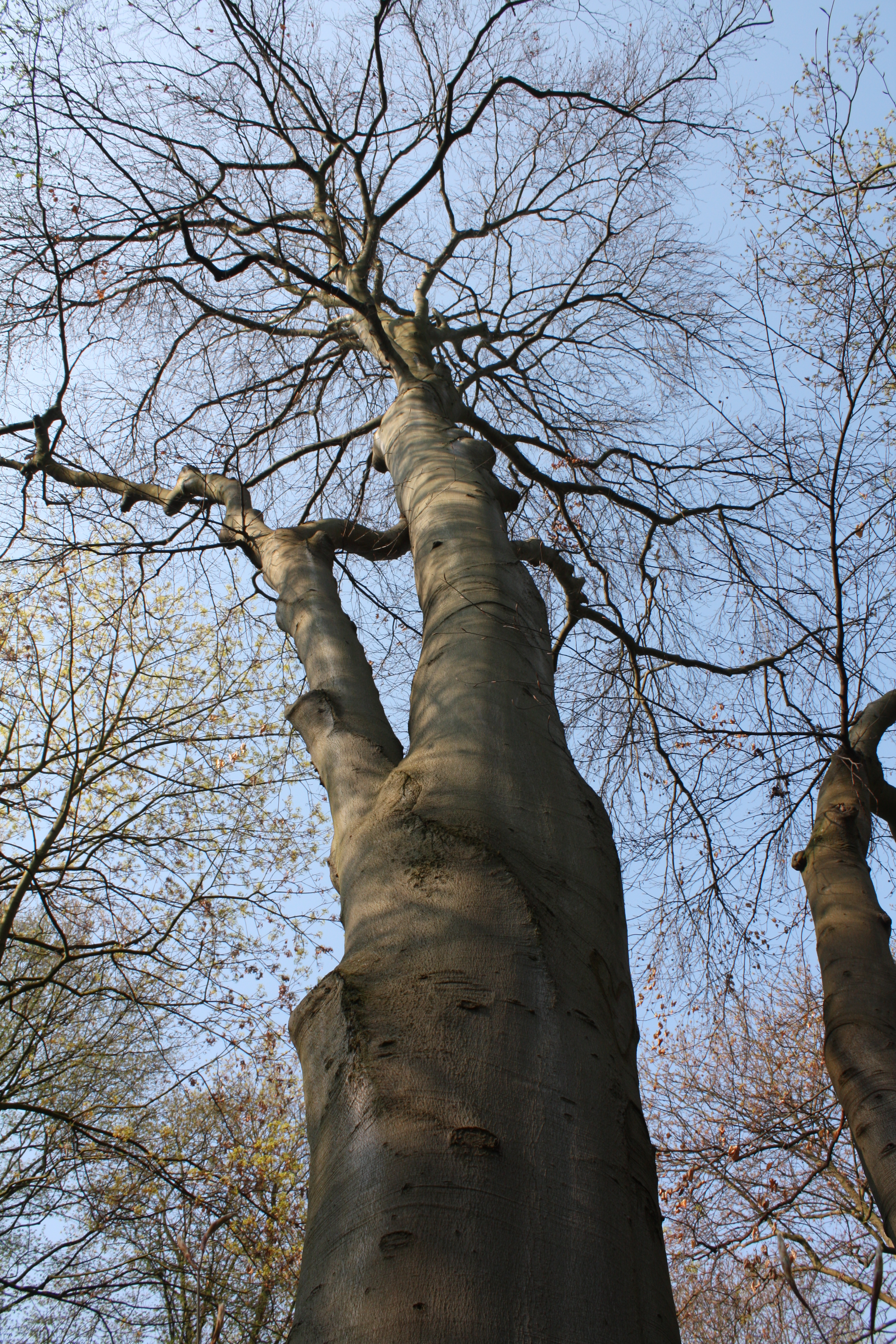 Schlosspark Lechenich, Stamm und Krone einer Buche